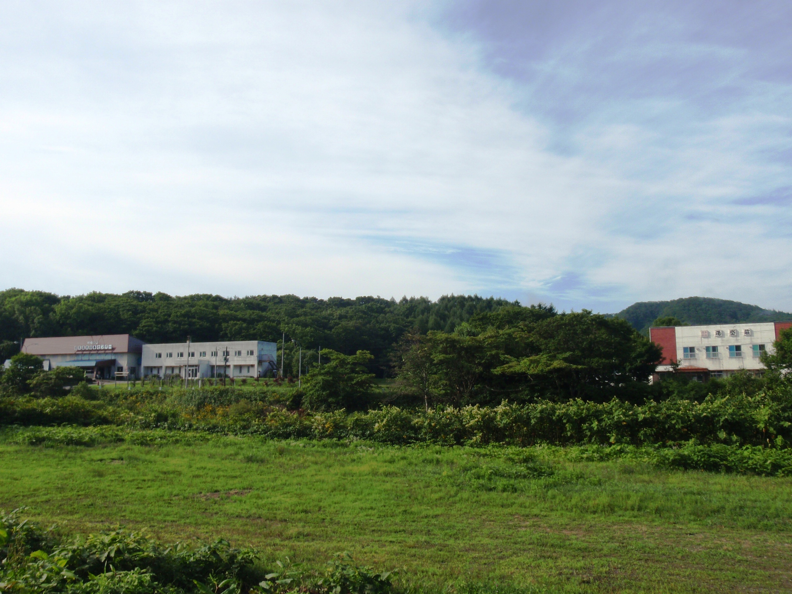 湯ノ岱温泉、左：国民温泉保養センター、右：湯ノ岱荘